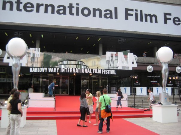 Immagine esterna del Festival di Karlovy Vary,io Rocco Panetta,opera propria, 11 luglio 2009